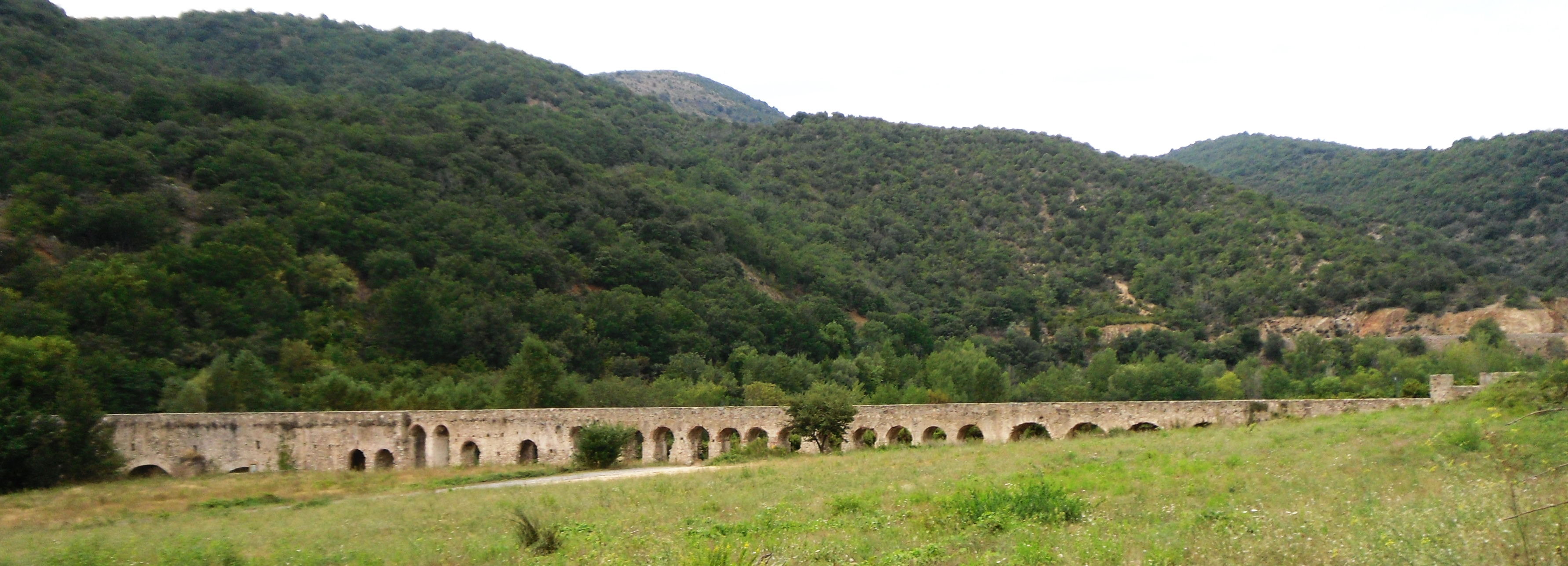 Pont-aqueduc romain d'Ansignan (Pyrénées-Orientales, France). Vue d'aval rive gauche.